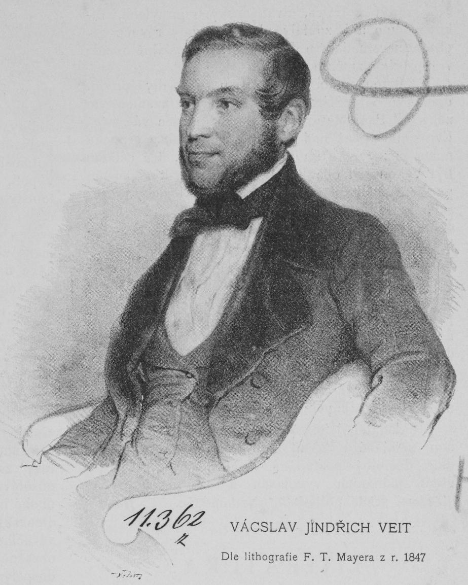 Portrait of Václav Jindřich Veit (in